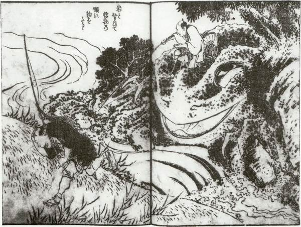 Ōgama (大蝦蟇) from Hokuetsy-Kidan (北越奇談)